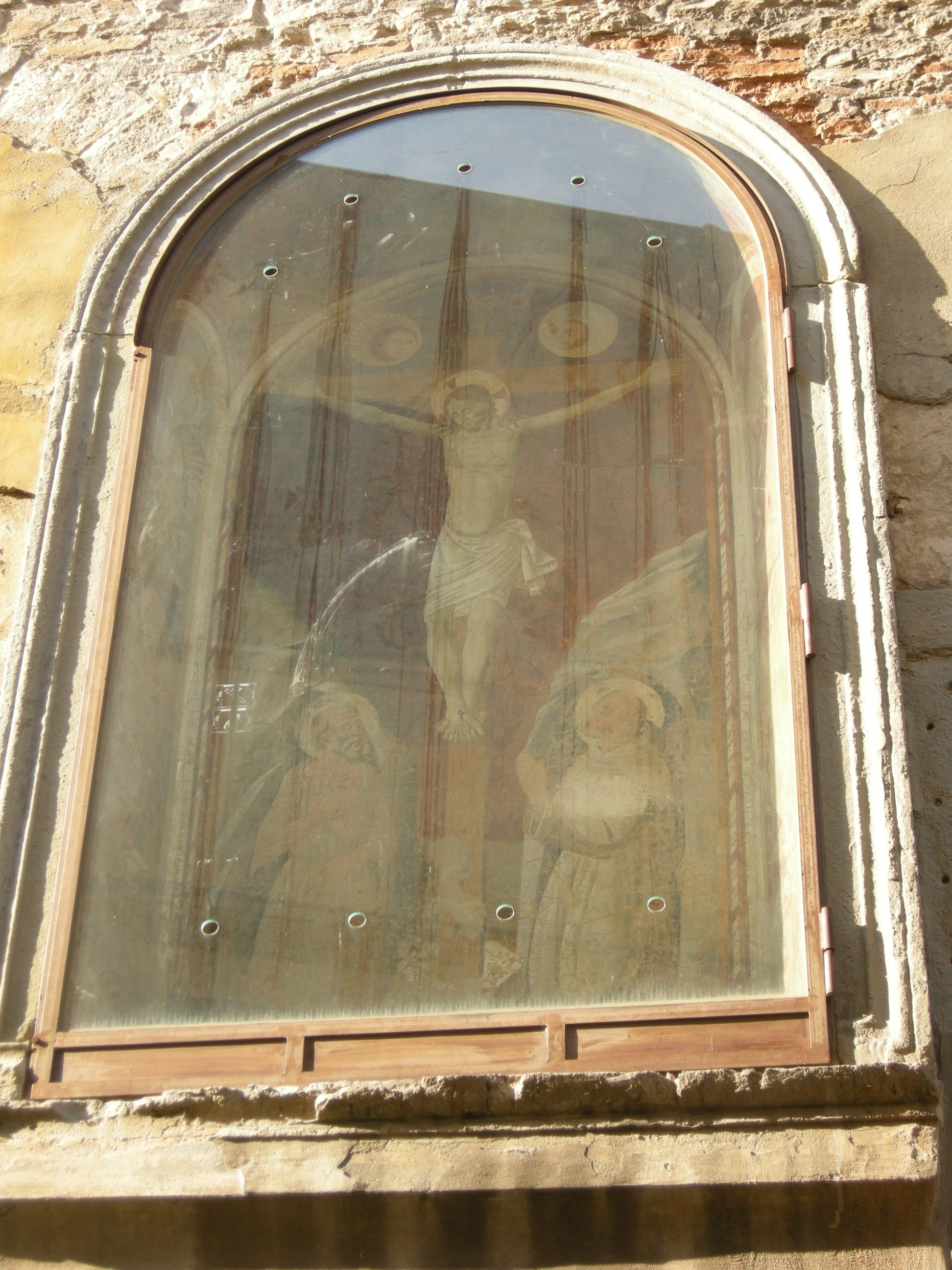 Santi Girolamo e Francesco alla Costa, tabernacolo di pier francesco fiorentino